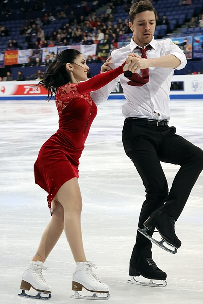 Татьяна Козьмава / Алексей Шумский (Грузия) на чемпионате мира 2017